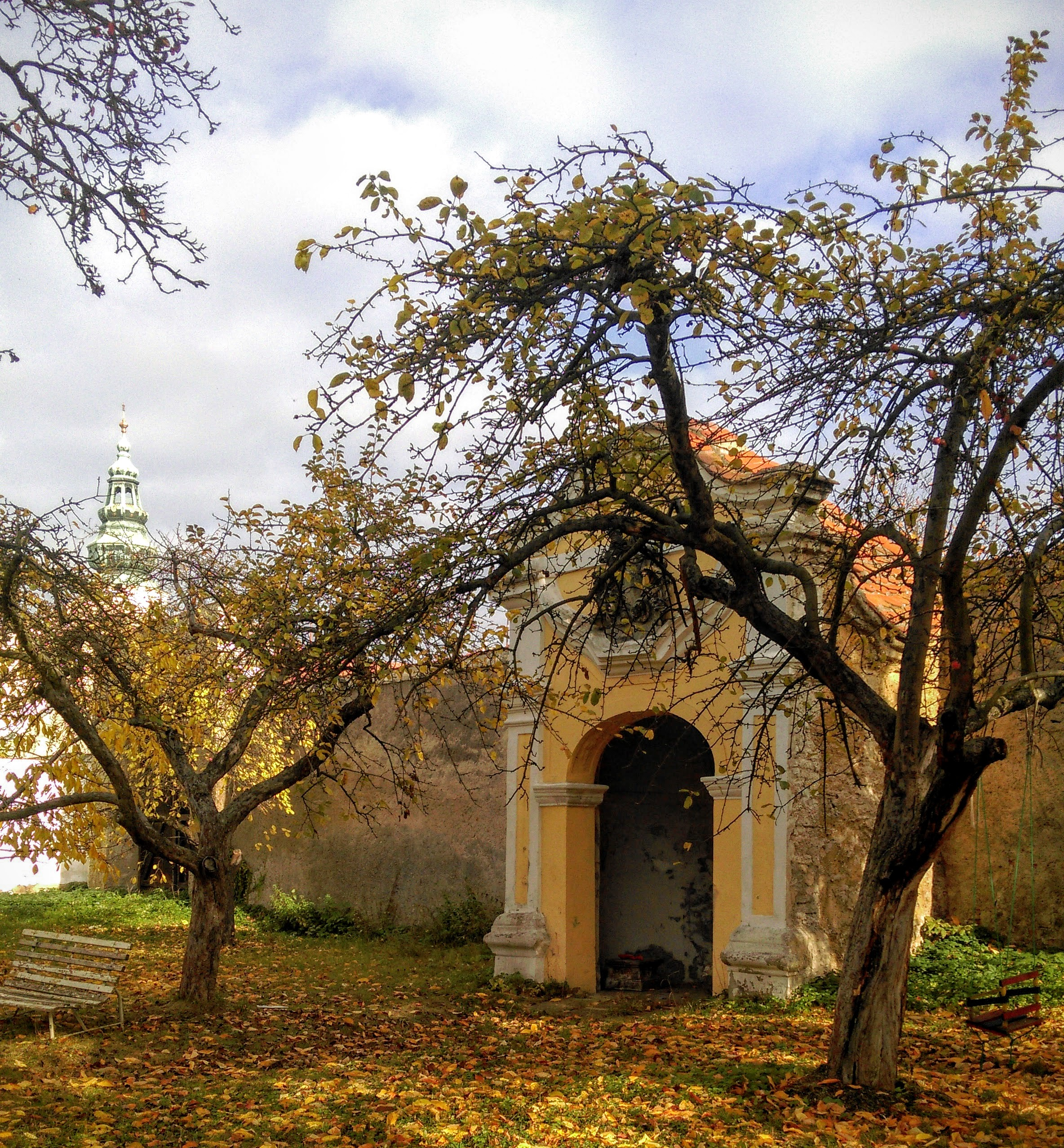 Proboštství, Stojanovo náměstí 5/3, Kroměříž.